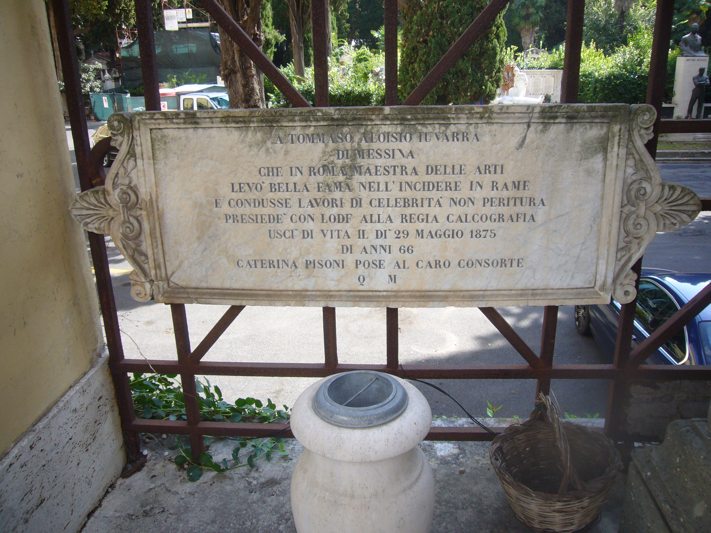 Roma, cimitero del Verano. Lapide di Tommaso Aloisio Juvara, incisore. È quanto resta della tomba, dopo il bombardamento del 19 luglio 1943.